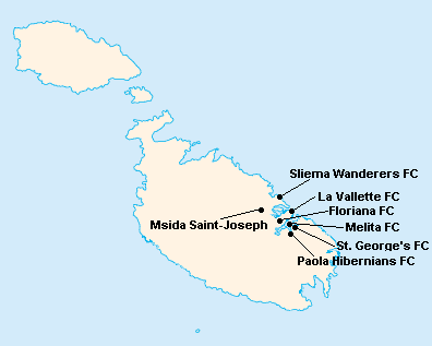 Répartition des clubs en First Division Maltaise 1945-1946.